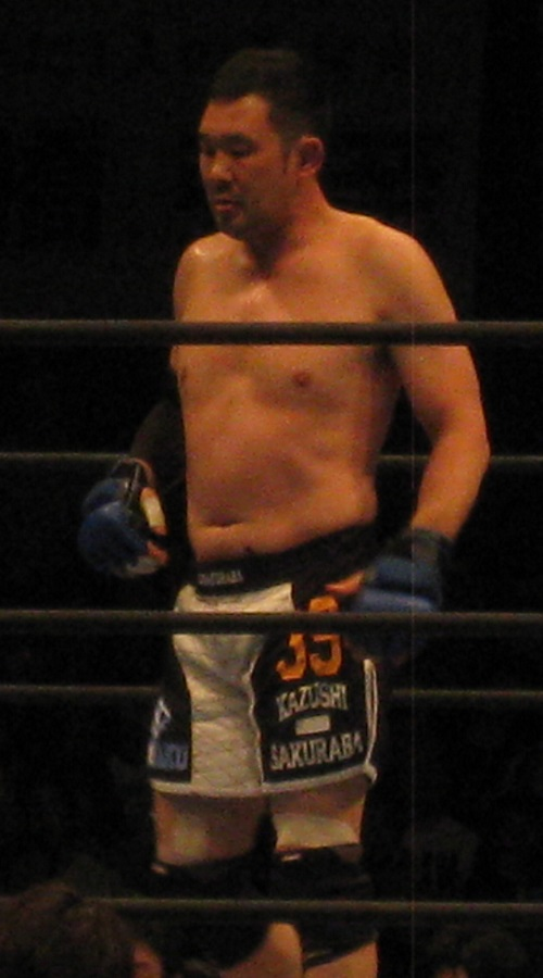 2013年11月9日 大阪府立体育会館 「POWER STRUGGLE」 桜庭和志